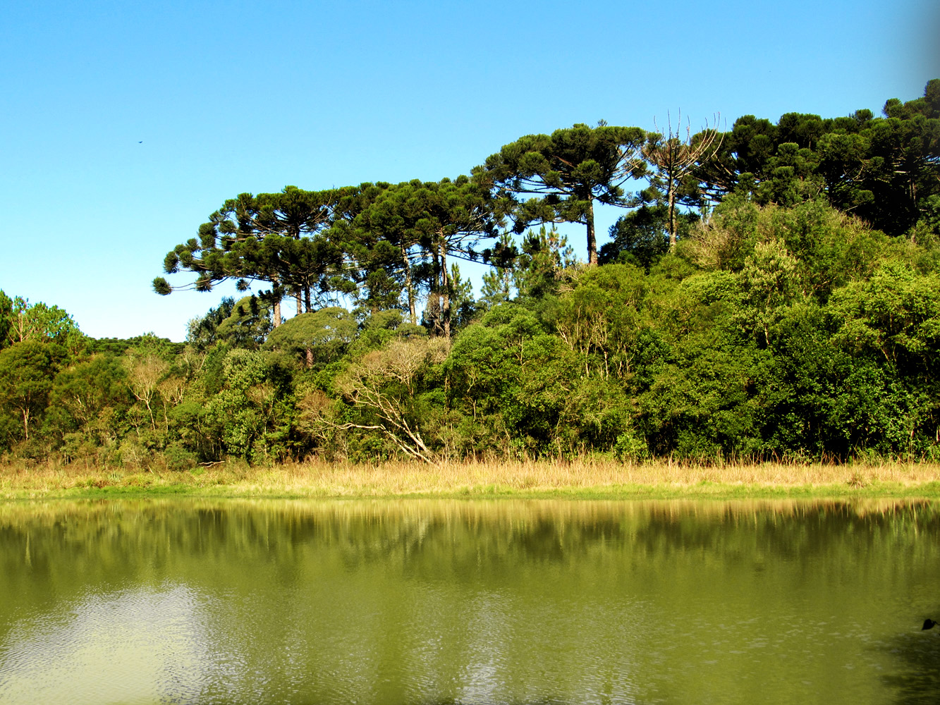 Refúgio das araucárias em volta do lago do Parque Estadual de Espigão Alto, ao Norte do Rio Grande do Sul.